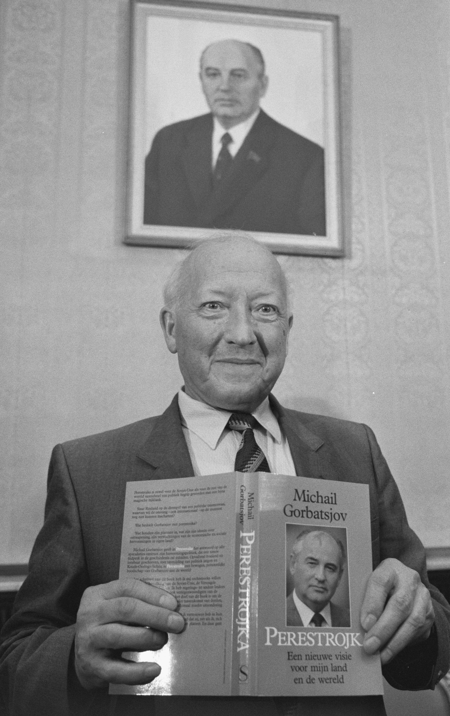 Russische ambassadeur Blatov met boek "Perestrojka" van Gorbatsjov